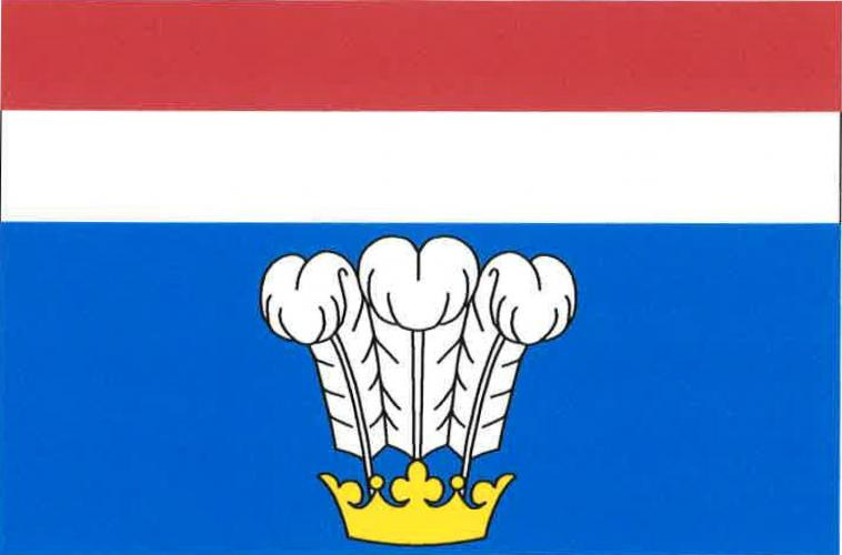 Spomyšl vlajka